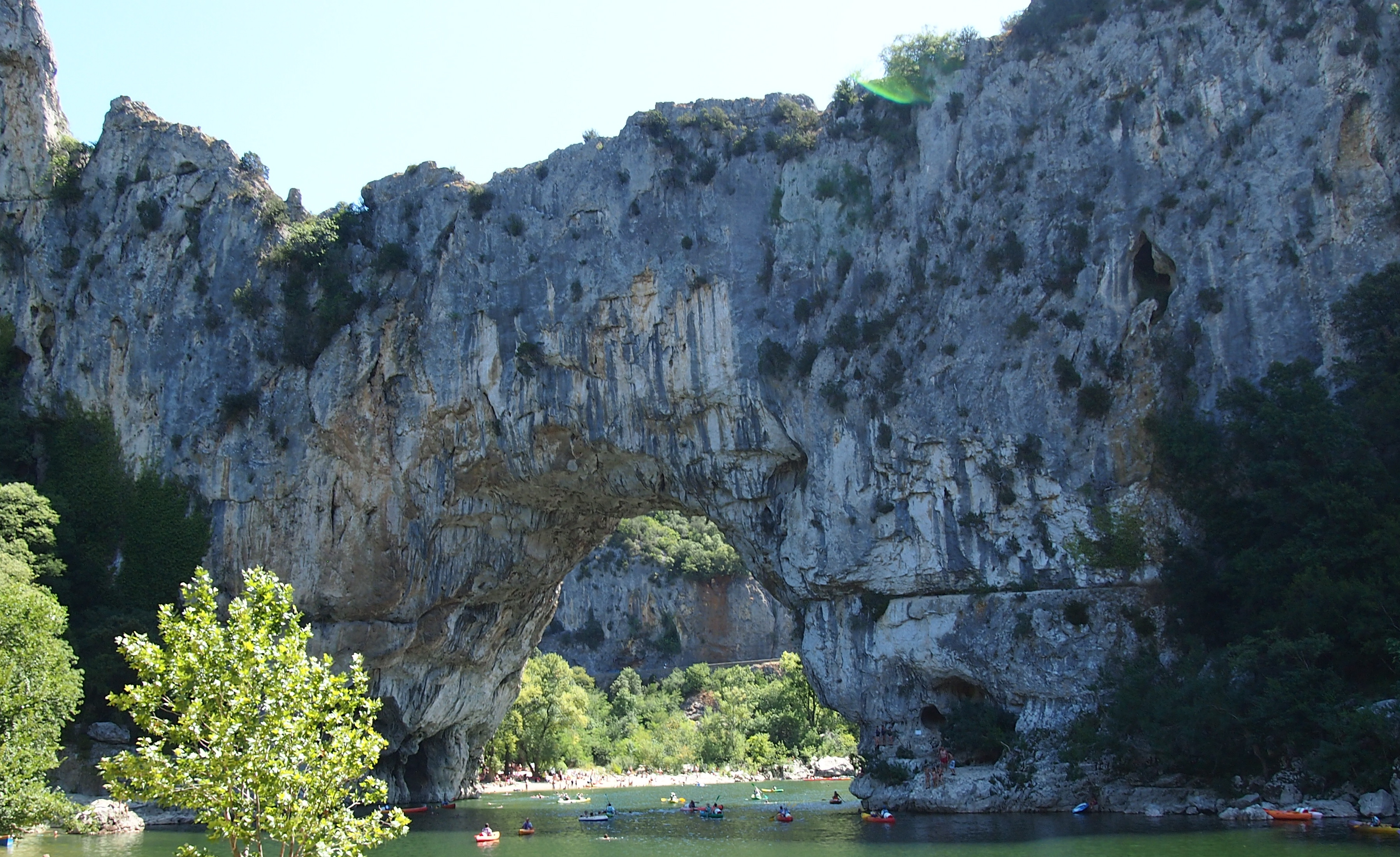 Pont d'Arc an der Ardèche